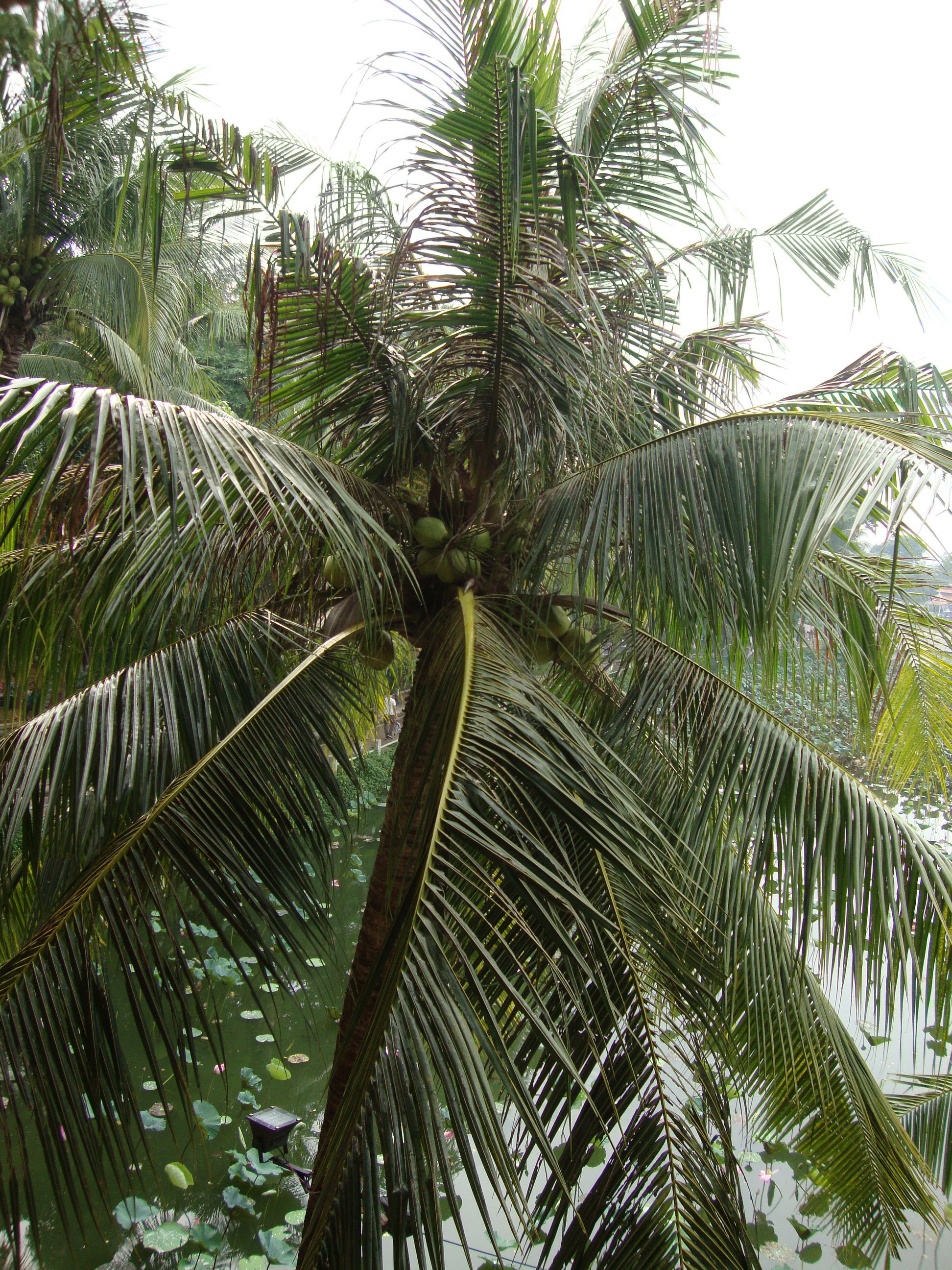 Cocos nucifera L., 1753